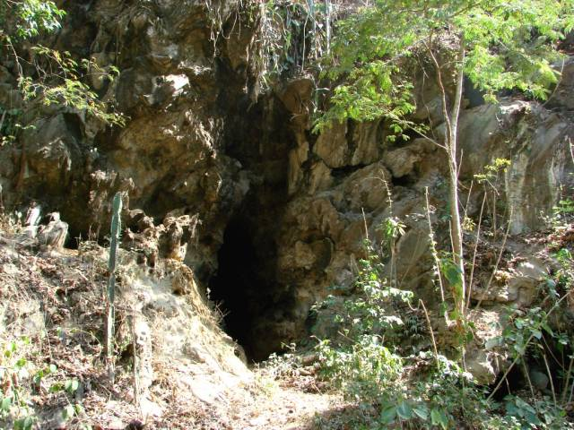 ElCuadrado-MinasOro